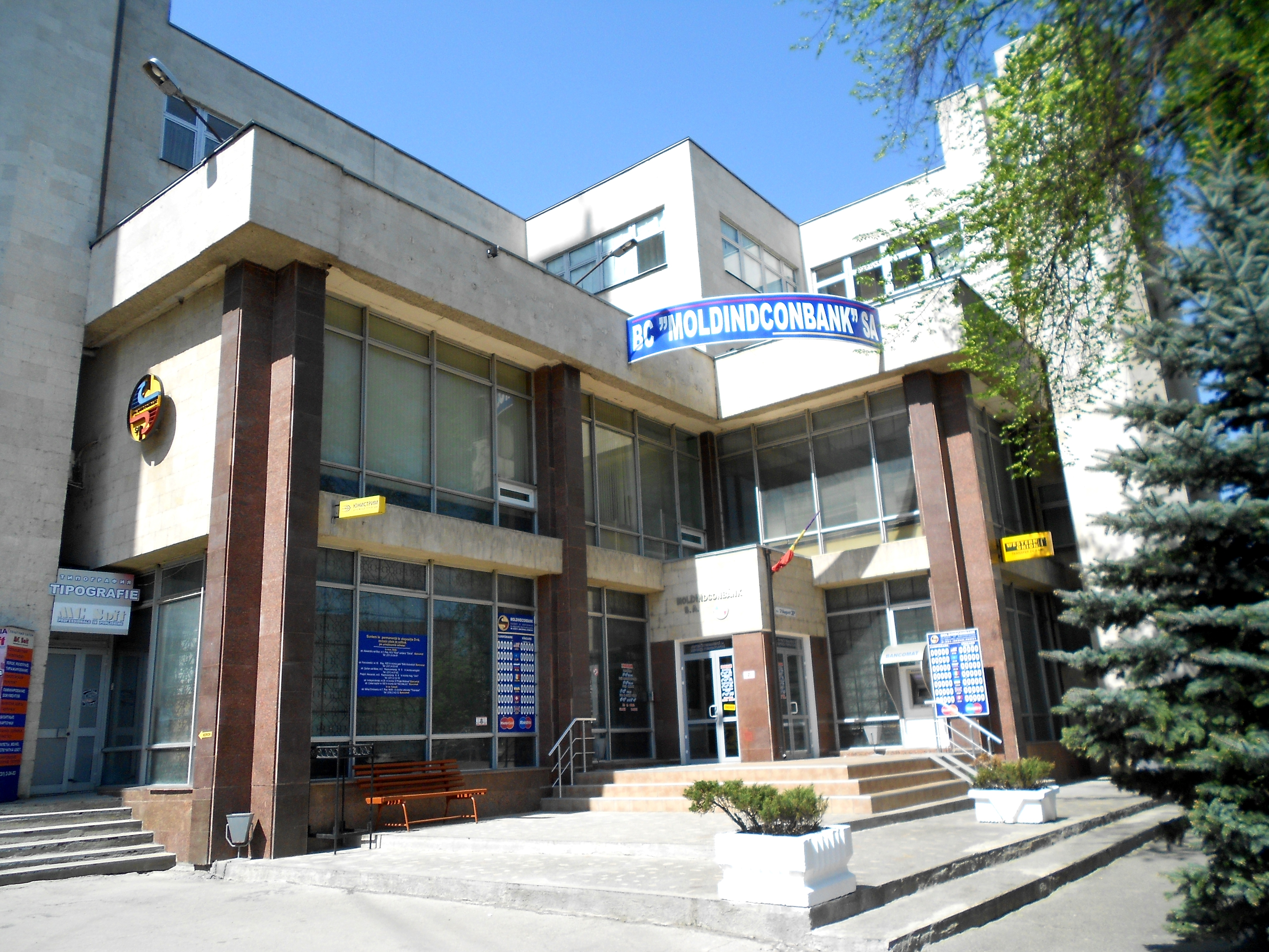 Moldincombank, filiala Bălți